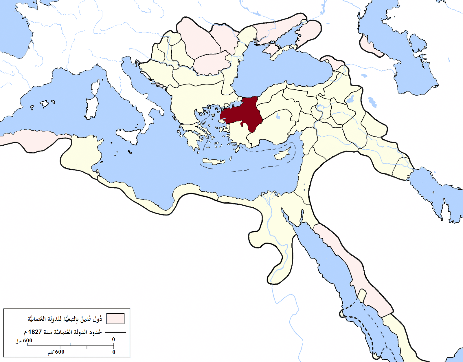 خريطة إيالة خداوندگار في الدولة العُثمانيَّة سنة 1827م.